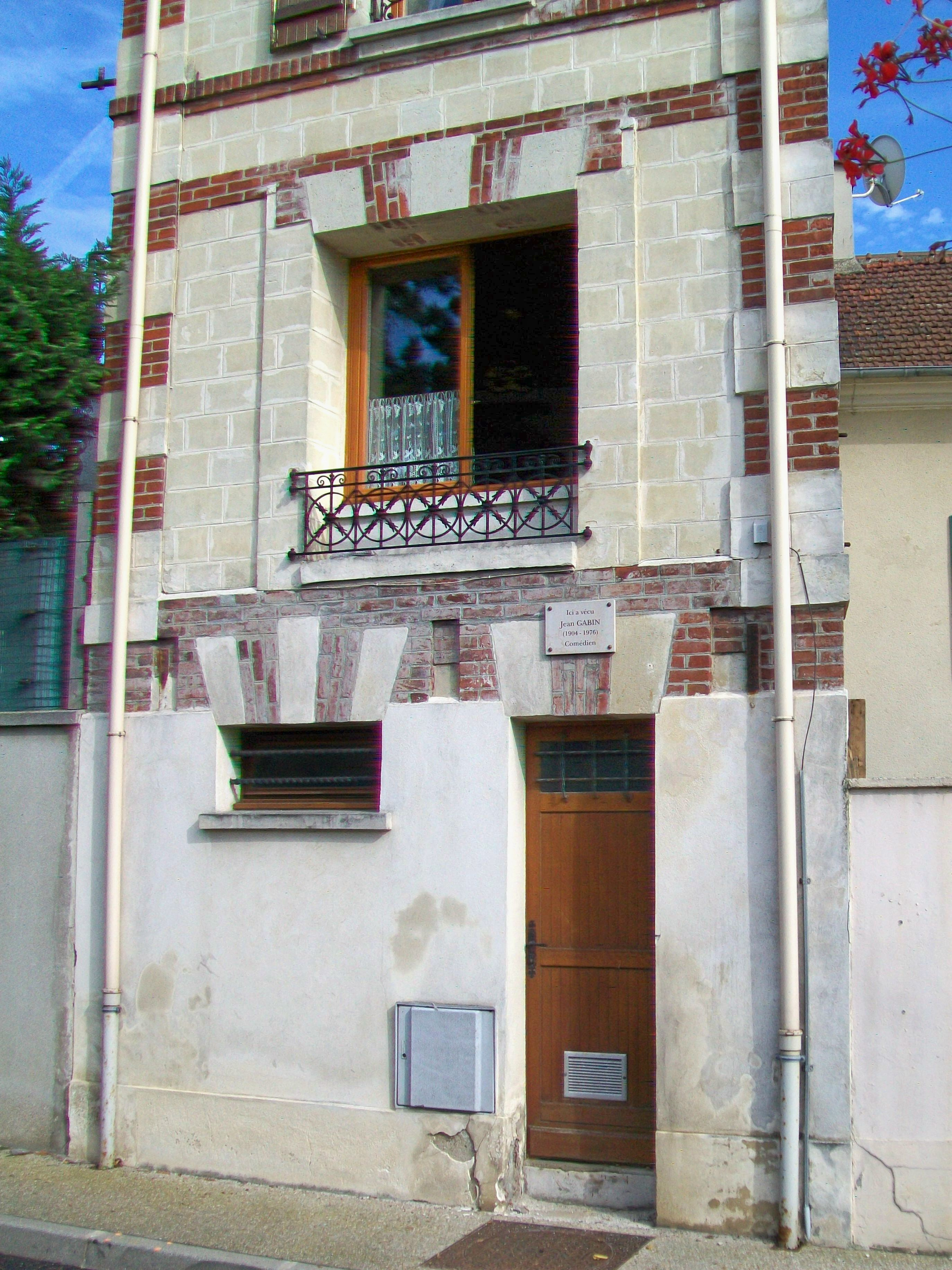 La maison où a vécu Jean Gabin, Grande rue, au nord du centre-ville (détail de la façade et plaque comméorative).